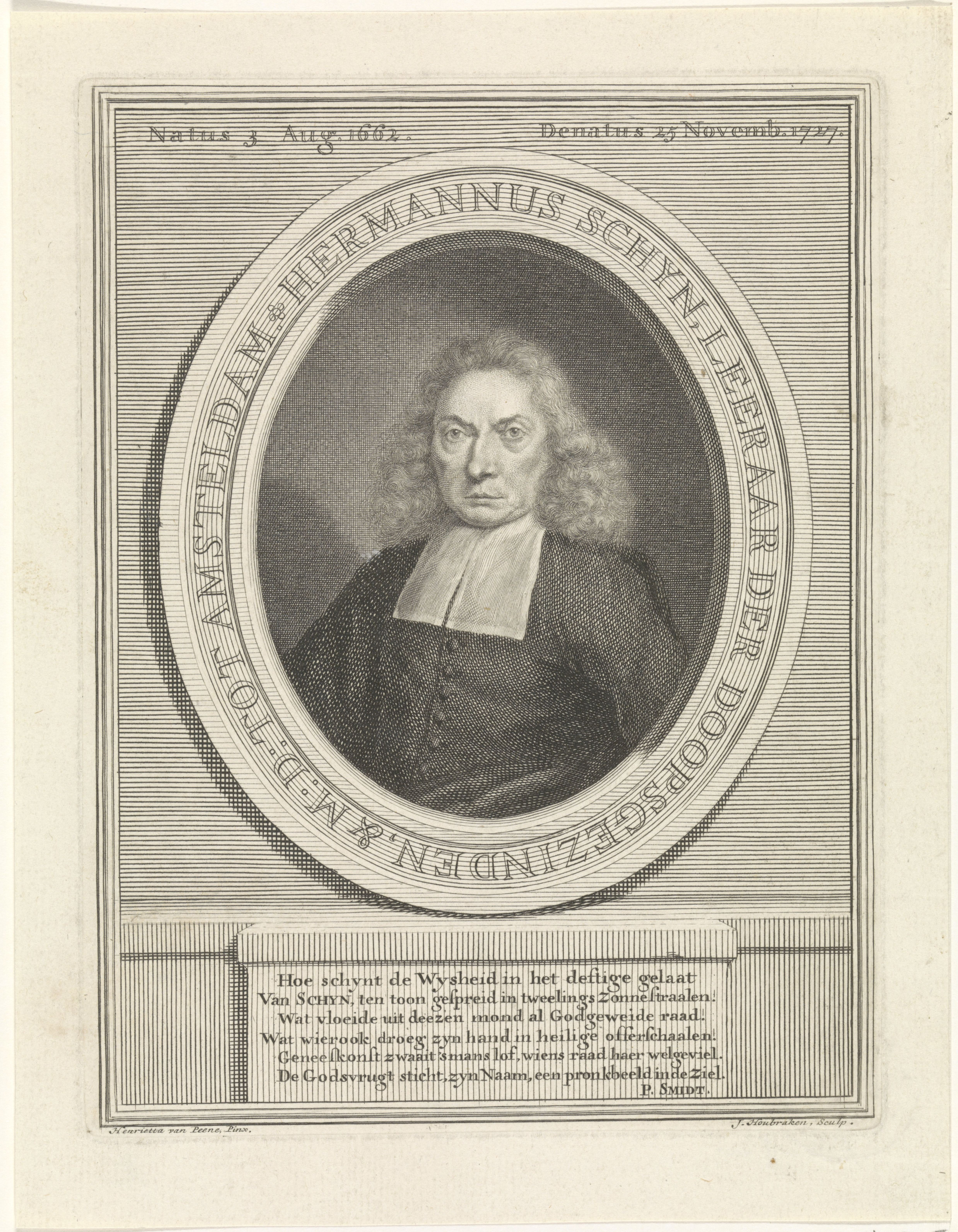 IdentificatieTitel(s): Portret van Herman SchijnHermannus Schyn (titel op object)Objecttype: prent Objectnummer: RP-P-OB-48.475Catalogusreferentie: Ver Huell 380Collectie Rijksmuseum-3(3)Opmerking: 3 staten in de collectie van het RijksmuseumFMP 4891-aOpschriften / Merken: verzamelaarsmerk, verso linksonder, gestempeld: Lugt 240Omschrijving: Buste van Herman Schijn in een ovaal medaillon met randschrift in het Nederlands. Bovenaan zijn geboorte- en sterfgegevens in het Latijn. Het portret rust op een richel Waar: op een zesregelig vers in het Nederlands.VervaardigingVervaardiger: prentmaker: Jacob Houbraken (vermeld op object)naar schilderij van: Henriëtte Wolters-van Pee (vermeld op object)schrijver: P. Schmidt (vermeld op object)Plaats vervaardiging: AmsterdamDatering: 1727 - 1708Fysieke kenmerken: gravureMateriaal: papier Techniek: graveren (drukprocedé)Afmetingen: plaatrand: h 175 mm × b 132 mmOnderwerpWie: Herman SchijnVerwerving en rechtenVerwerving: overdracht van beheer 1816Copyright: Publiek domein